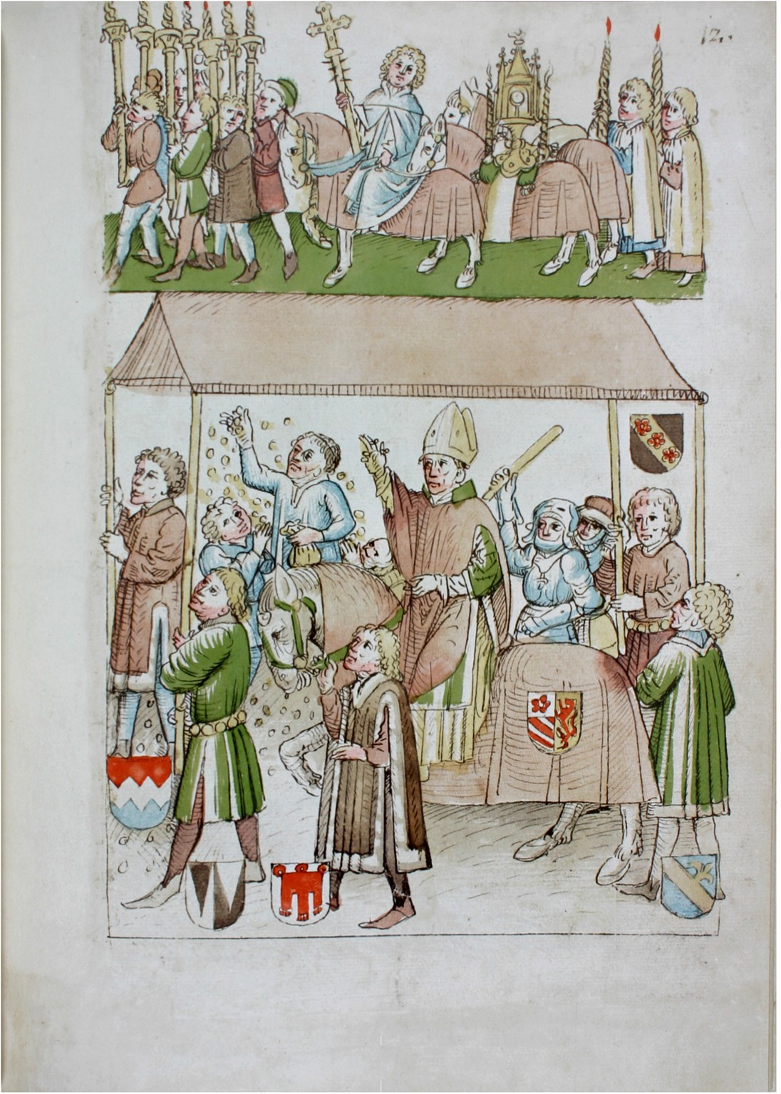 Rosgartenmuseum Konstanz, Hs. 1, Richental: Konzilschronik. In: Feger, Otto (Bearb.): Ulrich Richental: Das Konzil zu Konstanz. Faksimile. Starnberg - Konstanz 1964. Fol. 12r